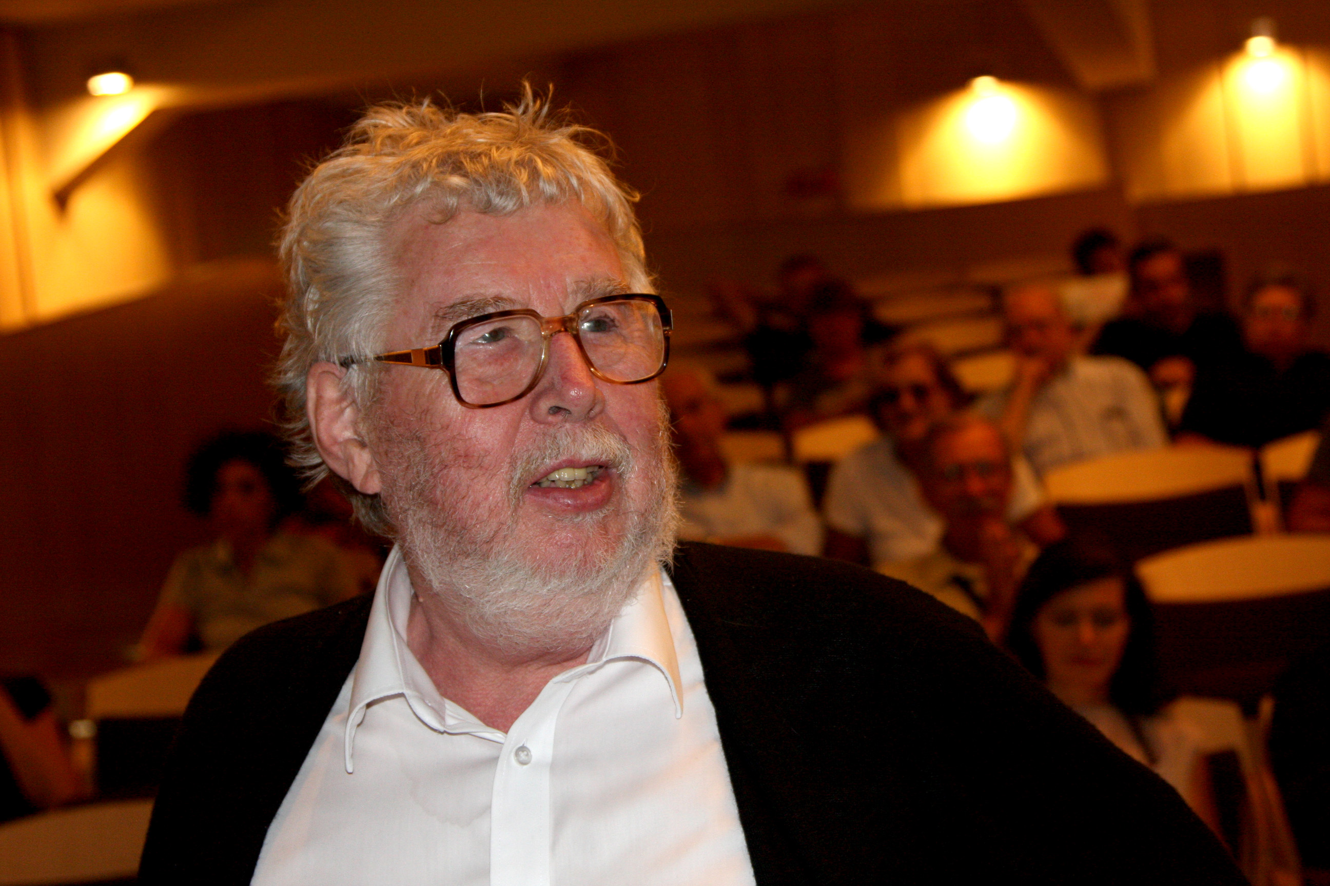 Torino, Teatro Vittoria. Incontro con il compositore Harrison Birtwistle